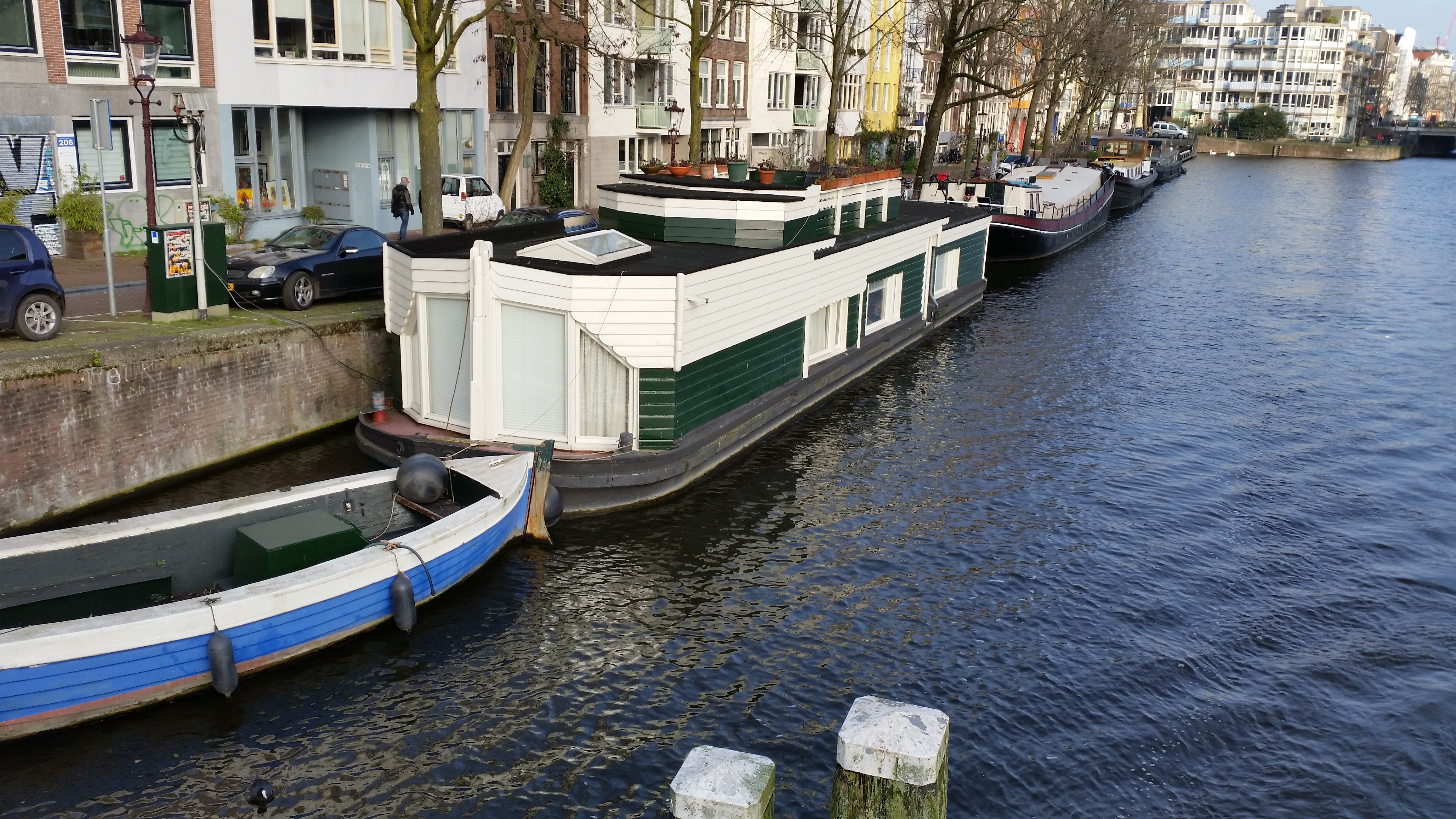 Woonschip de Wiekslag in/aan de Zwanenburgwal 182, Amsterdam-Centrum